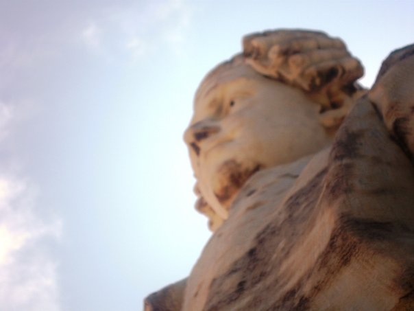 Busto Principe Imperiale visto dal basso